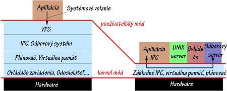 Štruktúra založená na monolitickom a mikrokernelovom operačnom systéme.